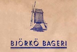 Marum väderkvarn på Björkö Bageris mjölpåse (före 1957)